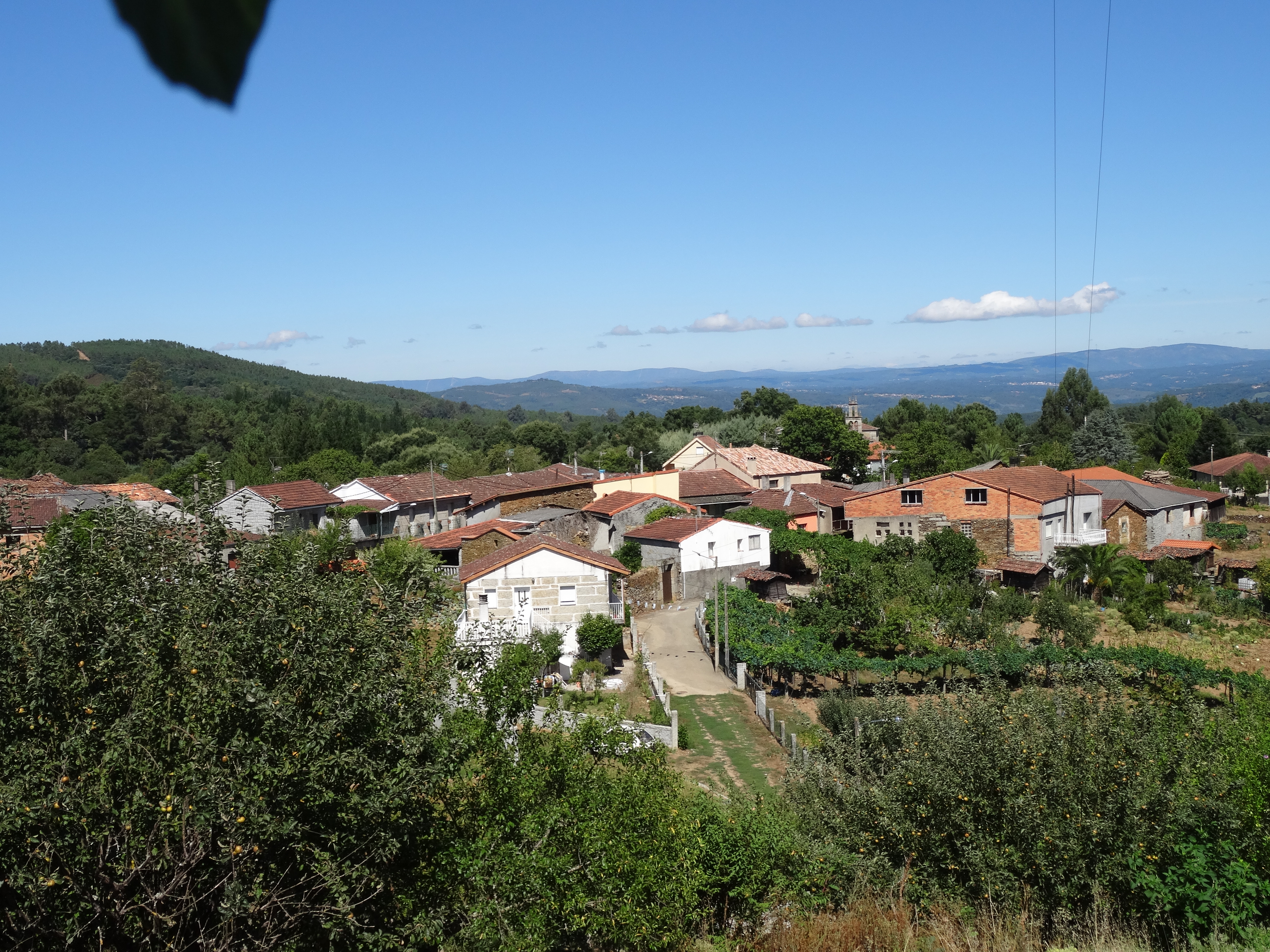 Ver título.